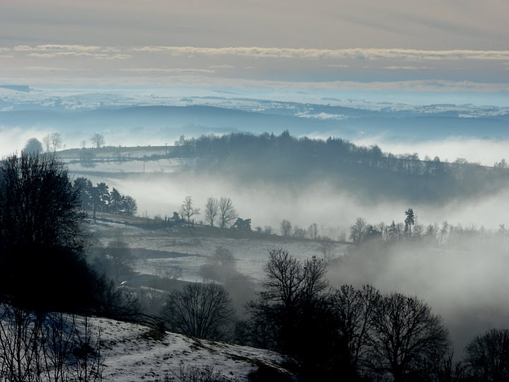 Plateau de Raulhc ou du Coyan ?